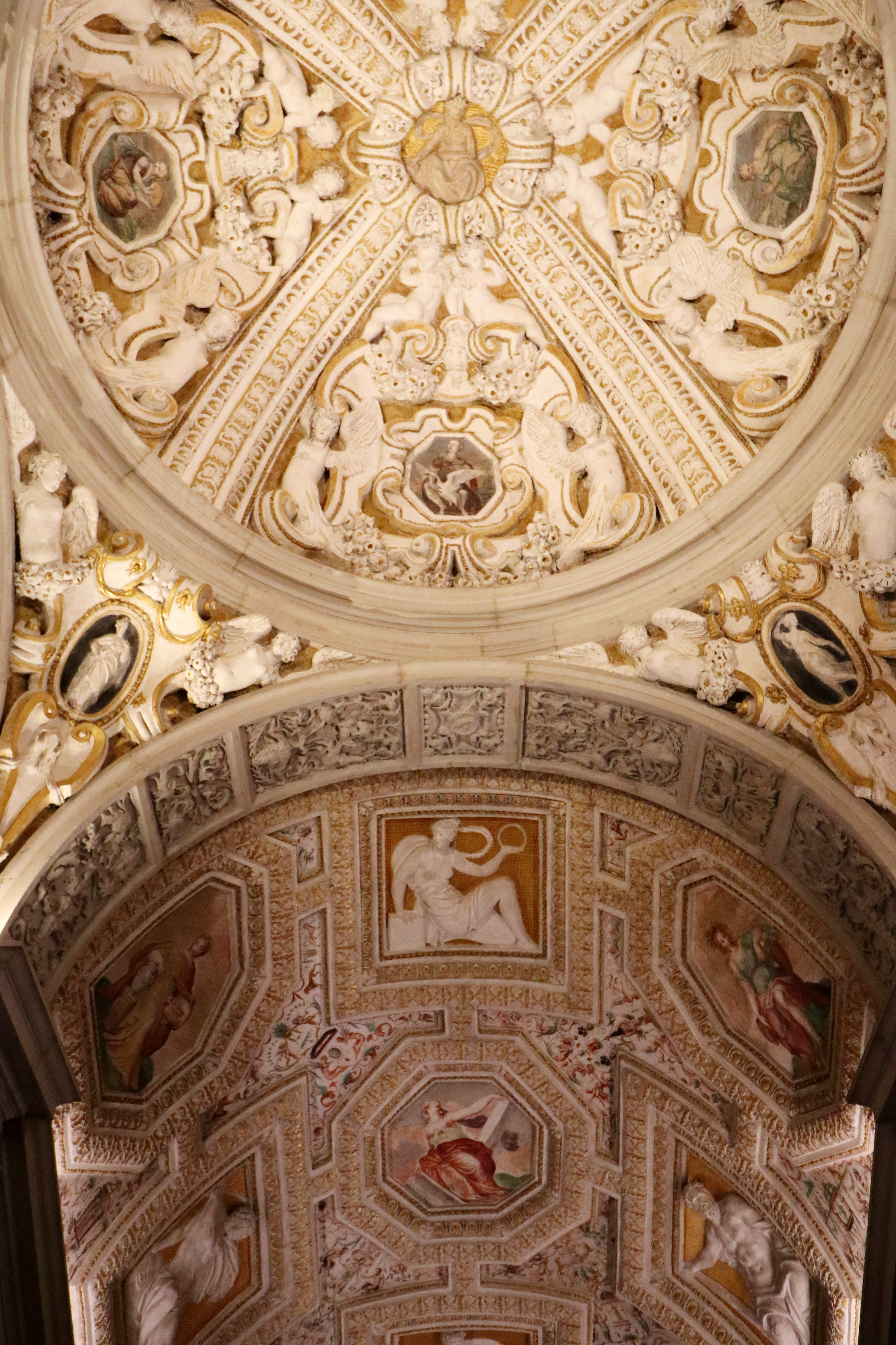 Biblioteca nazionale Marciana This is a photo of a monument which is part of cultural heritage of Italy.